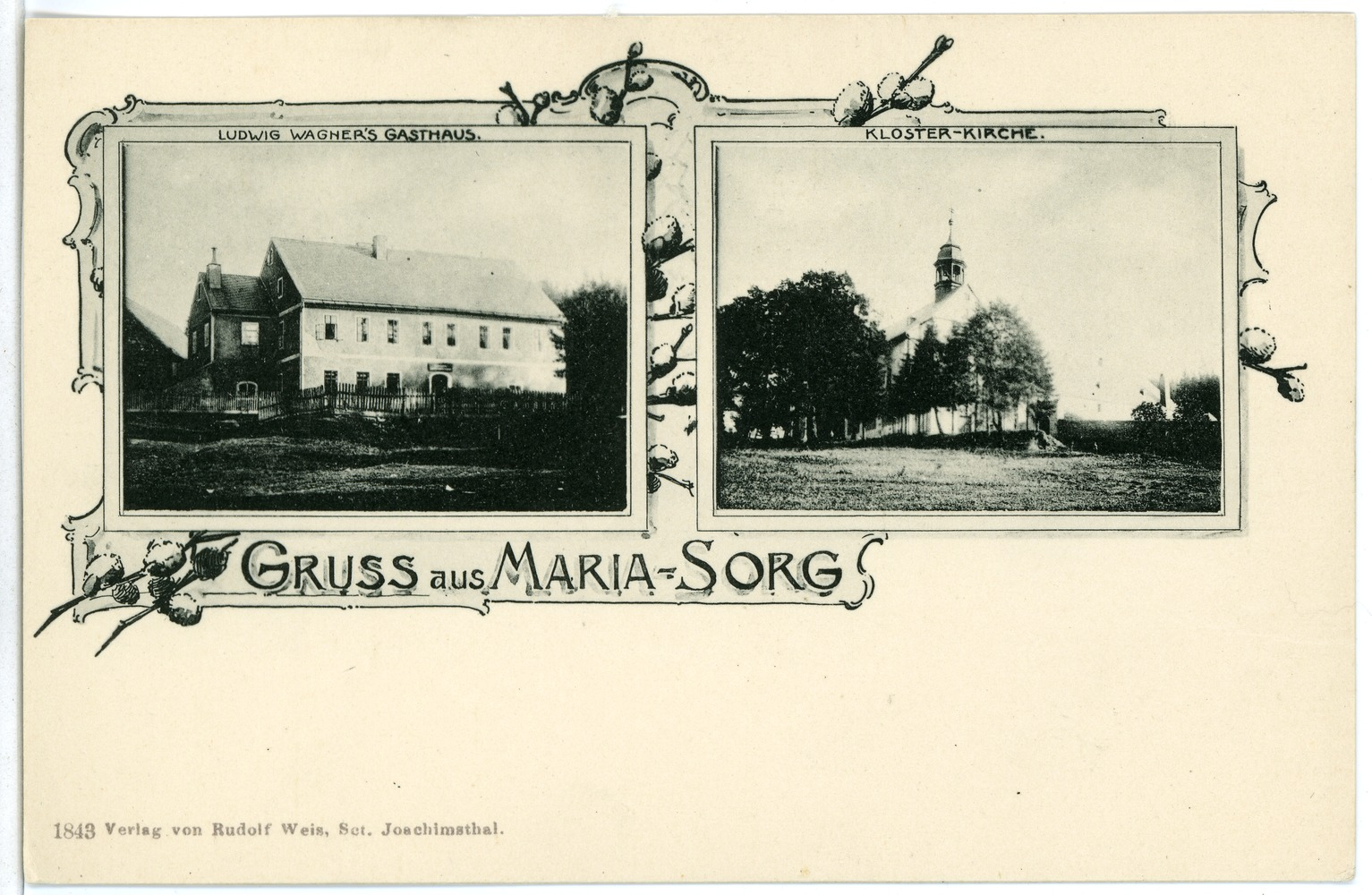 Maria-Sorg; Kloster-Kirche, L. Wagners Gasthaus This postcard is from publisher Brück & Sohn in Meißen ( postcard has a unique number 01843 and is available in a higher resolution at the publisher. This images was uploaded in a cooperation project between Wikipedians and the publisher.